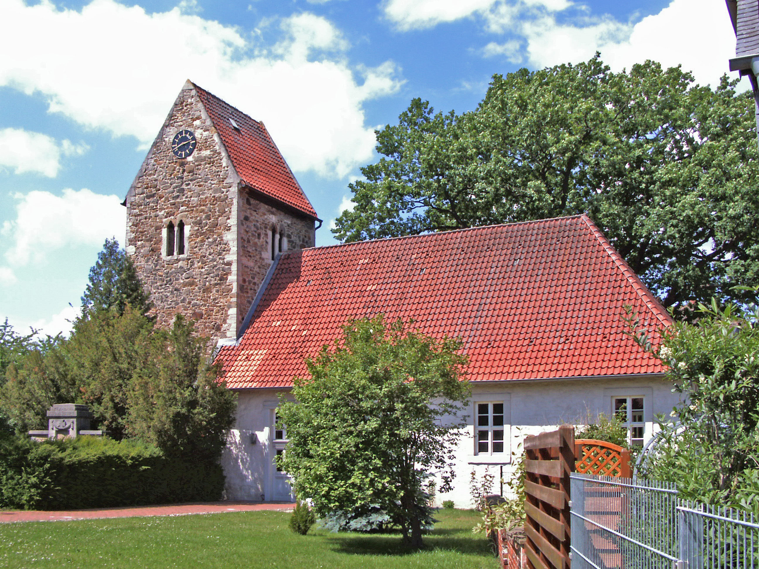 Evangelisch-lutherisache Kirche in Neindorf, Ortsteil von Wolfsburg